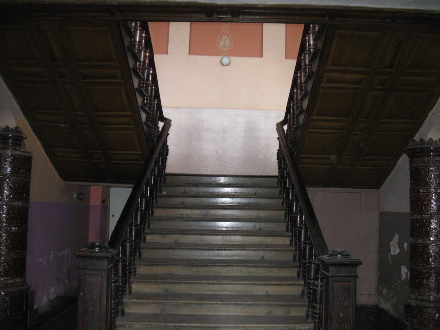 dwór